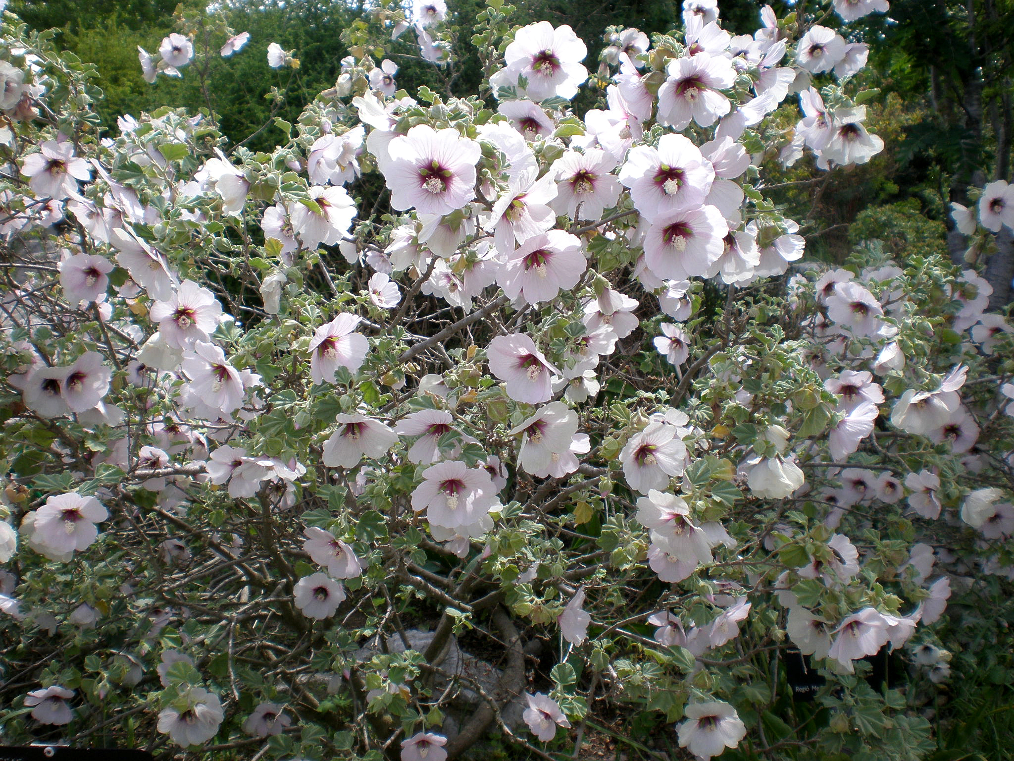 Jardín Botánico de Barcelona.